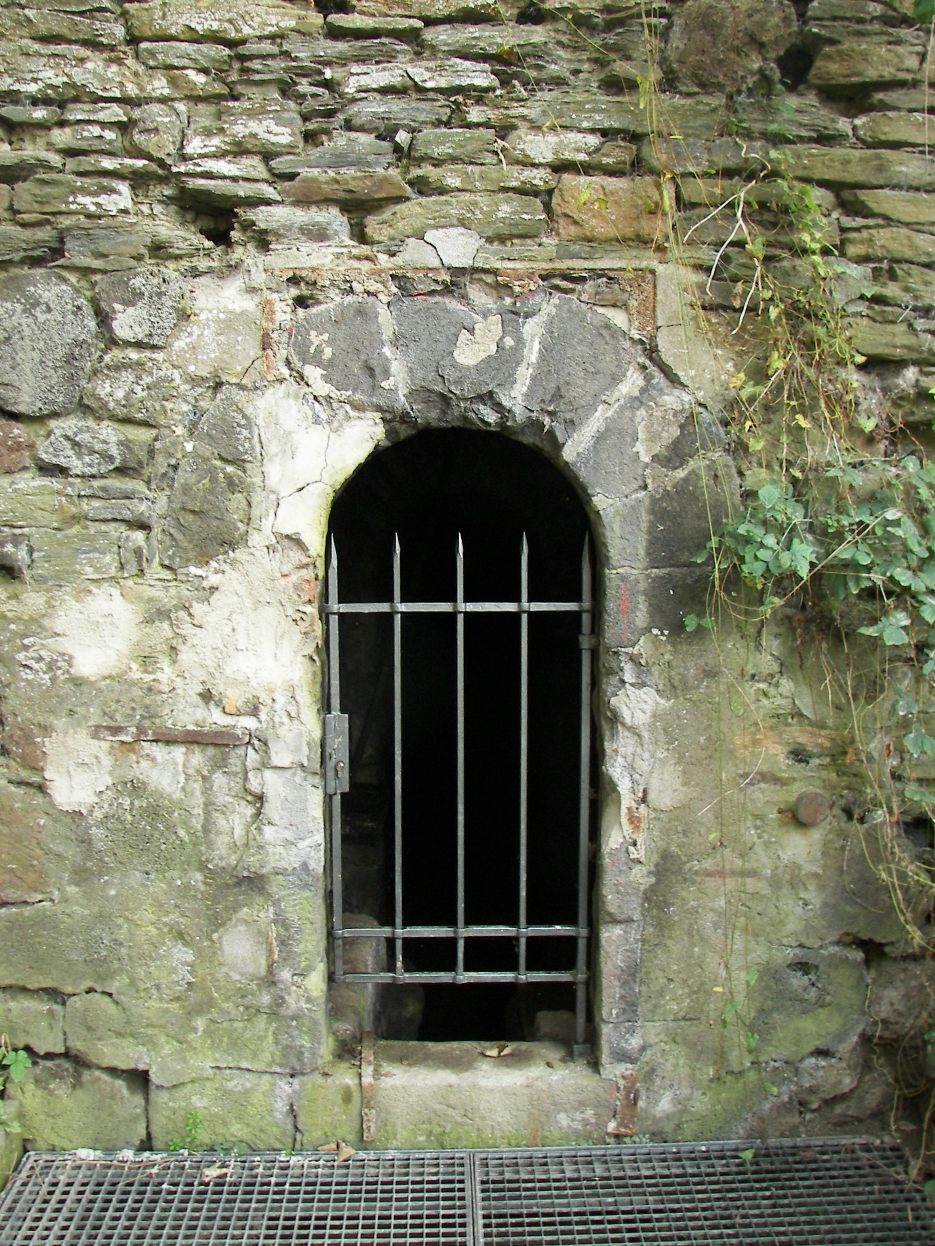 Graben am Laacher See